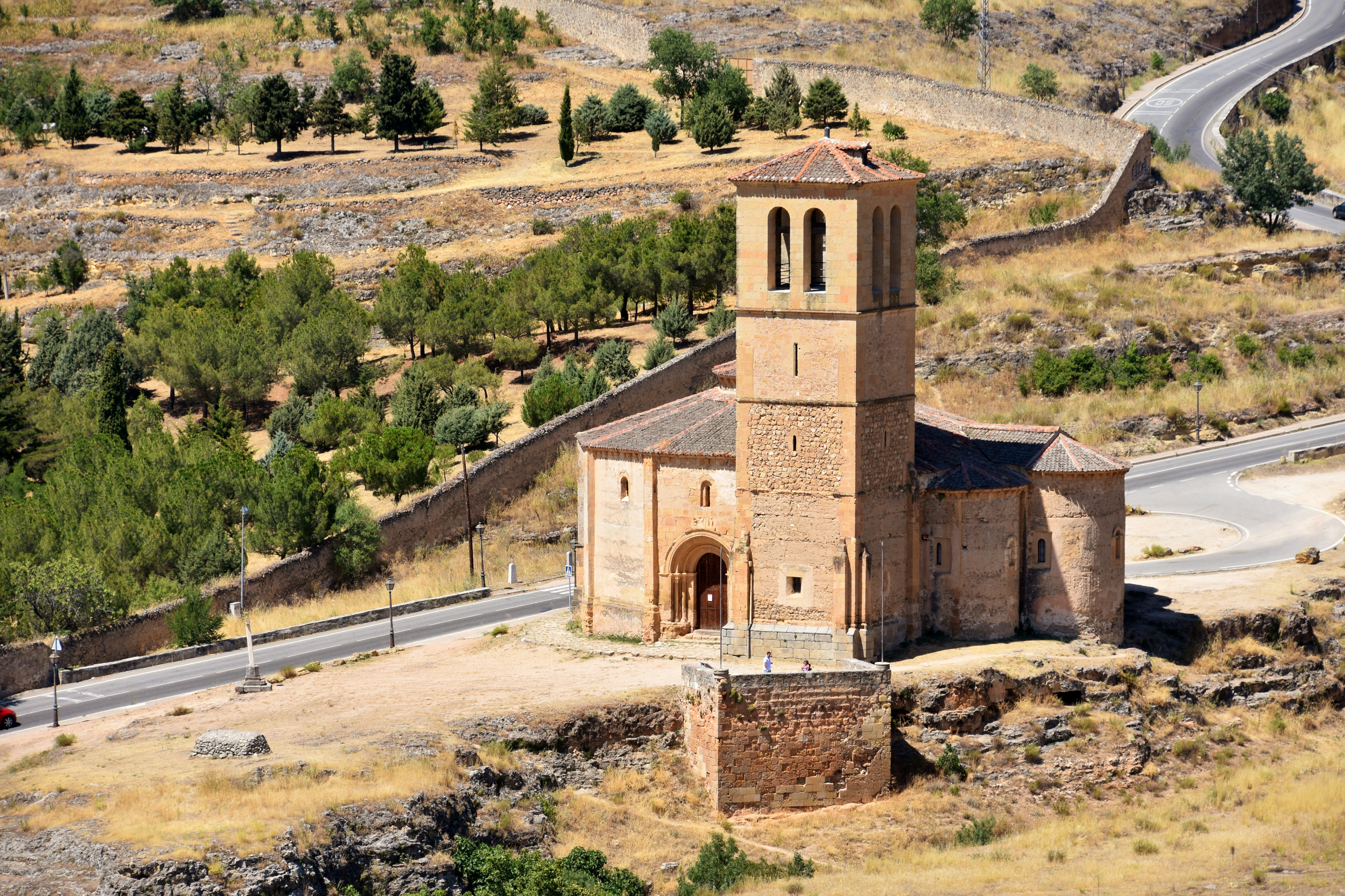 Iglesia de la Vera Cruz, Segovia, 13th century